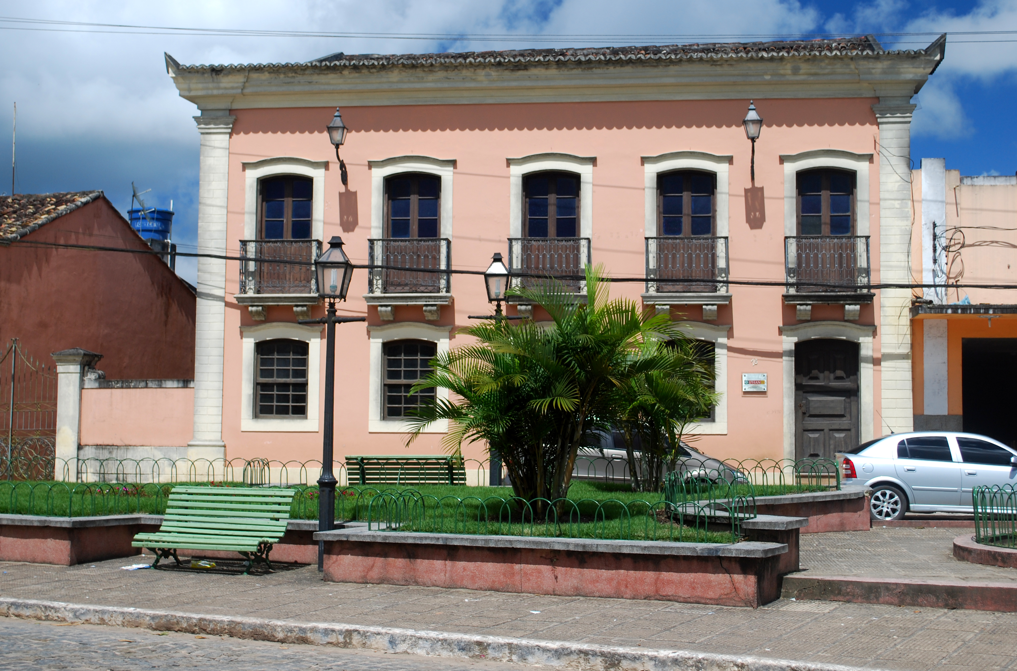 Solar de José Rufino.